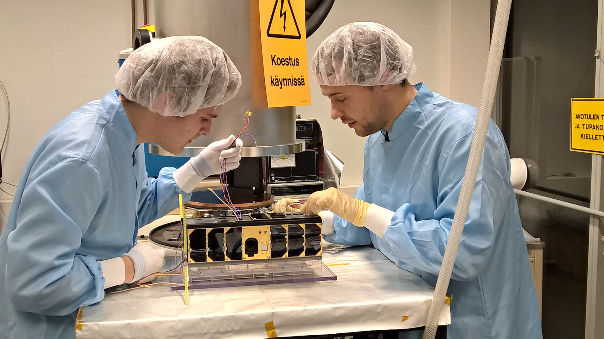 Aalto-1 testattavana.